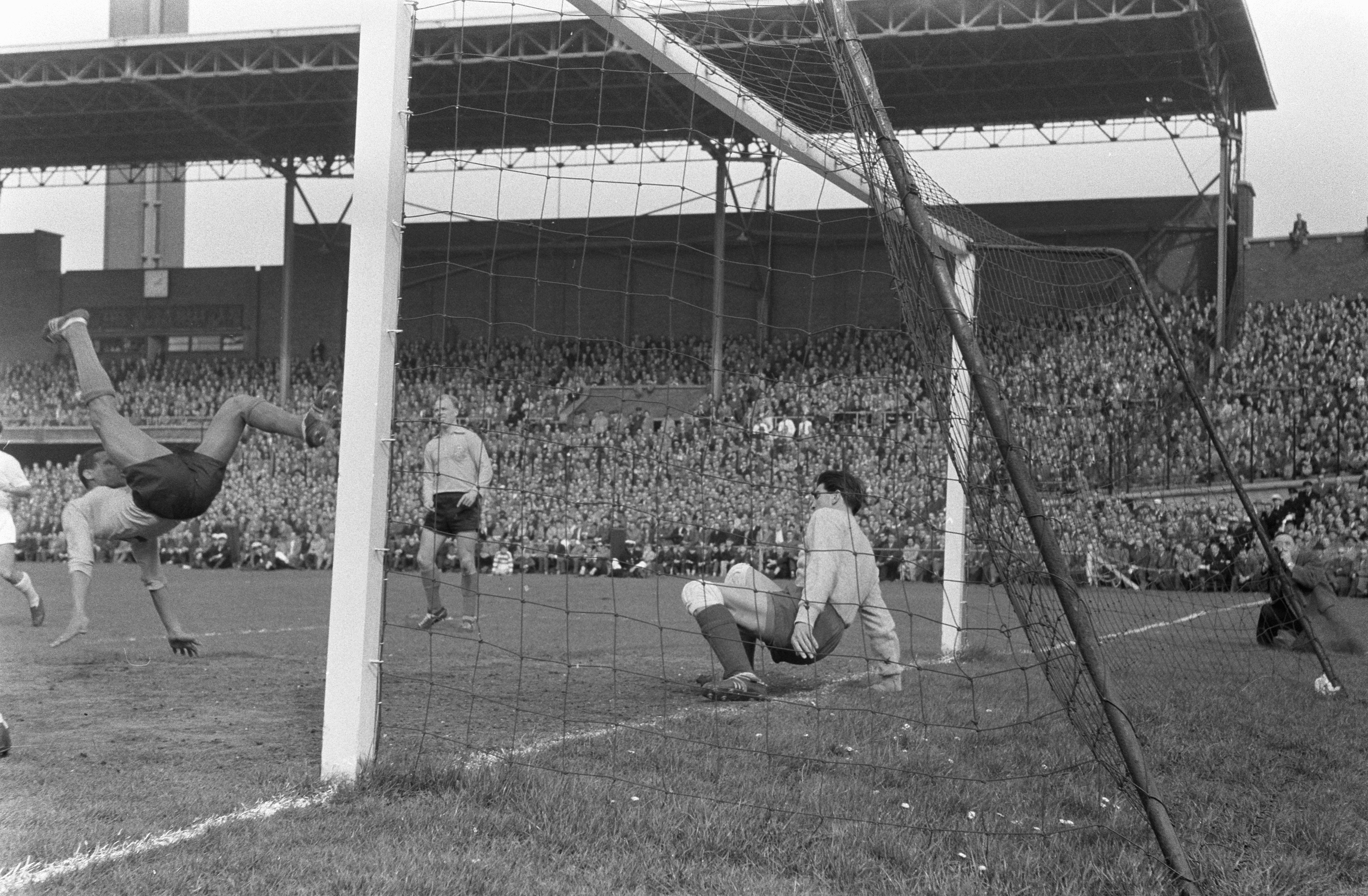 Collectie / Archief : Fotocollectie Anefo Reportage / Serie : [ onbekend ] Beschrijving : Nederland tegen Bulgarije 4-2 in het Olympisch Stadion Humphrey Mijnals in actie Datum : 3 april 1960 Locatie : Bulgarije, Nederland Trefwoorden : ACTIE Persoonsnaam : Humphrey Mijnals Instellingsnaam : Olympisch Stadion Fotograaf : Pot, Harry / Anefo Auteursrechthebbende : Nationaal Archief Materiaalsoort : Negatief (zwart/wit) Nummer archiefinventaris : bekijk toegang 2.24.01.05 Bestanddeelnummer : 911-1437